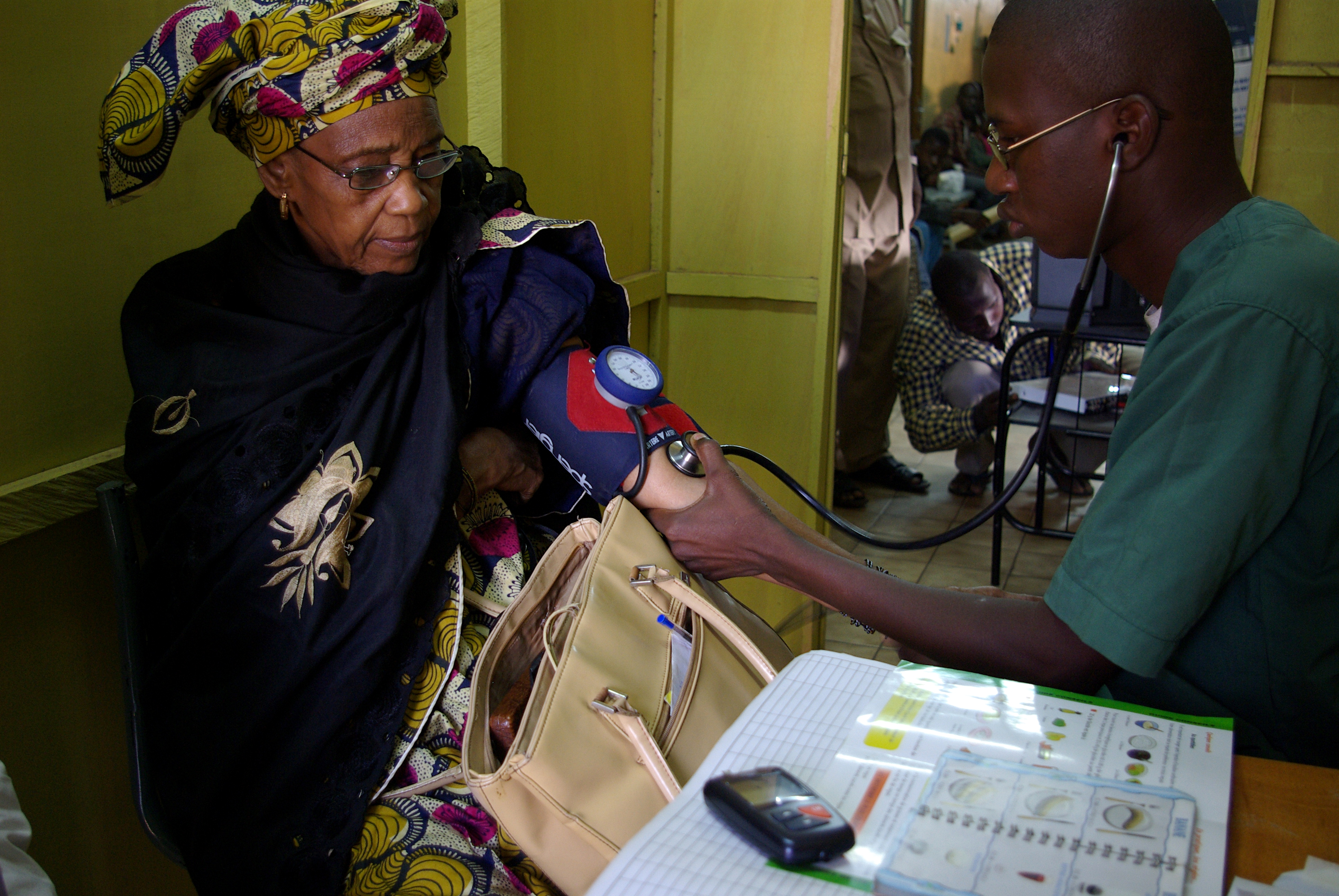 Olivier Hebrard, OTRS pending